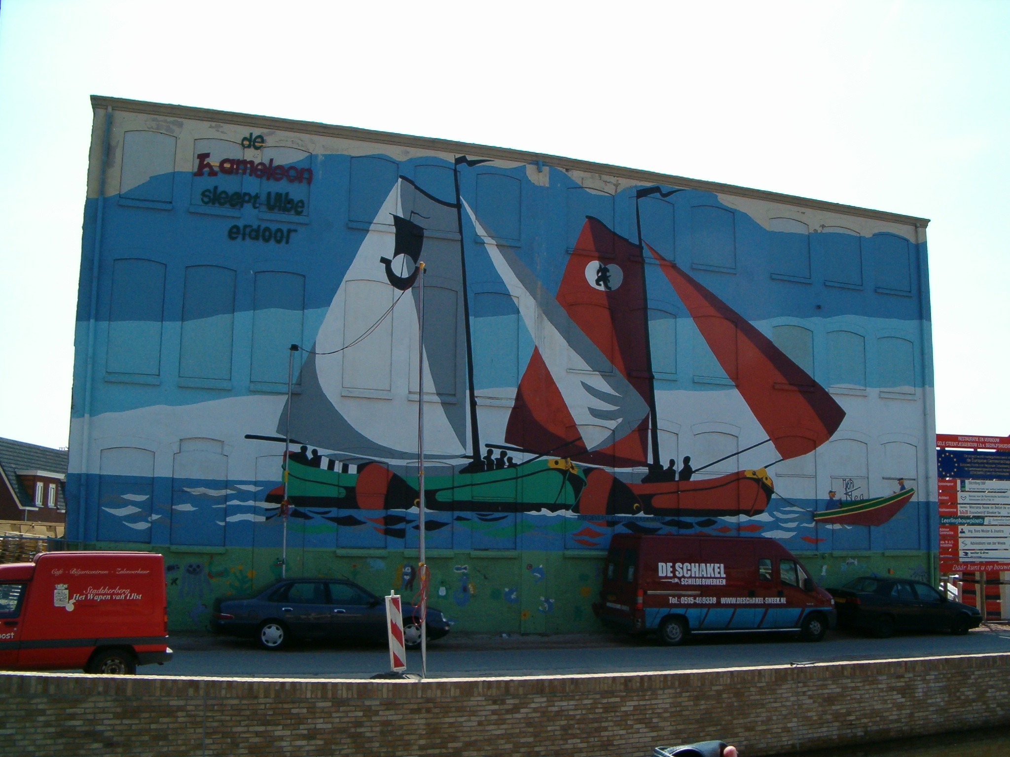 Self made picture.